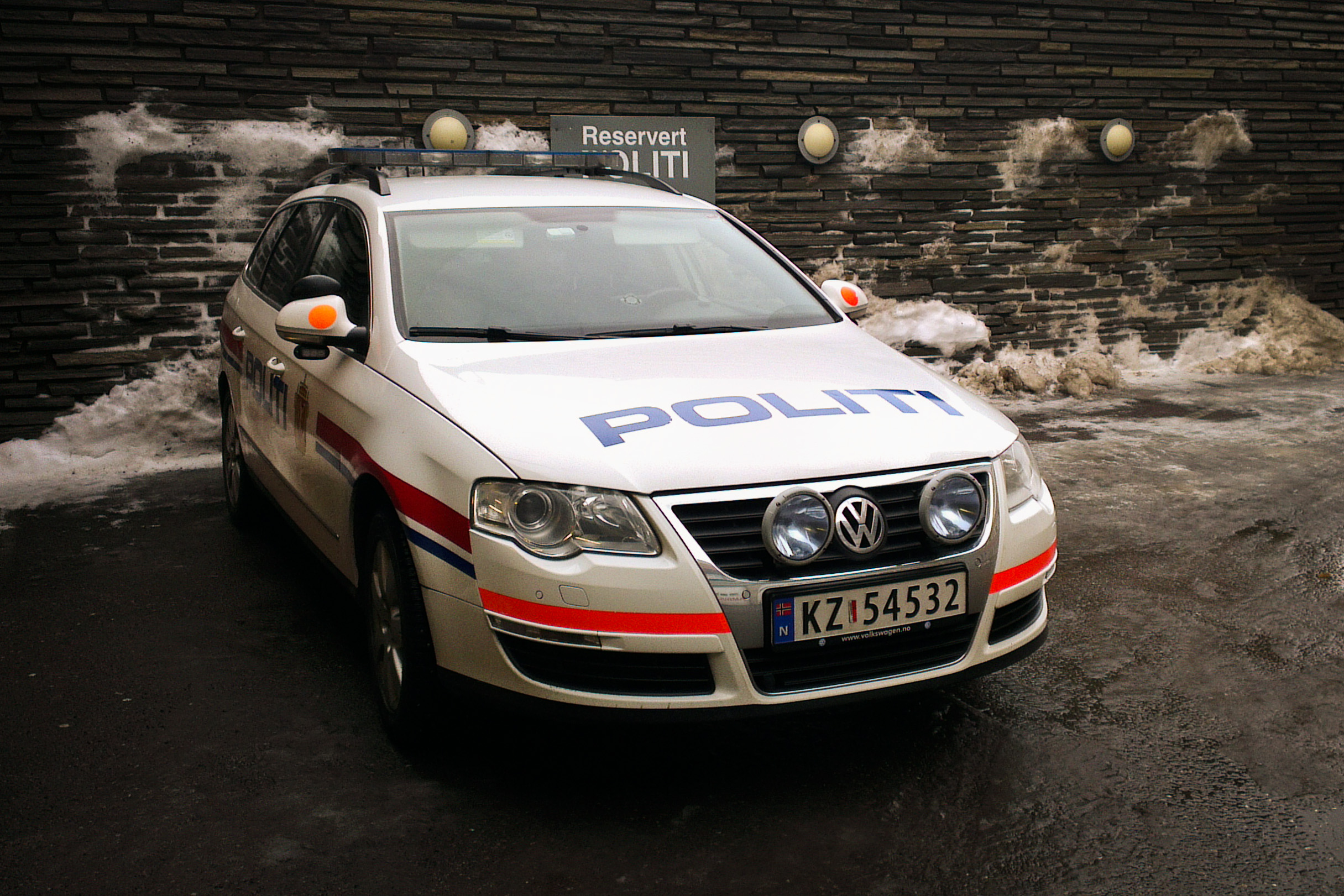 Norsk politibil, Volkswagen Pasat 2007-modell.